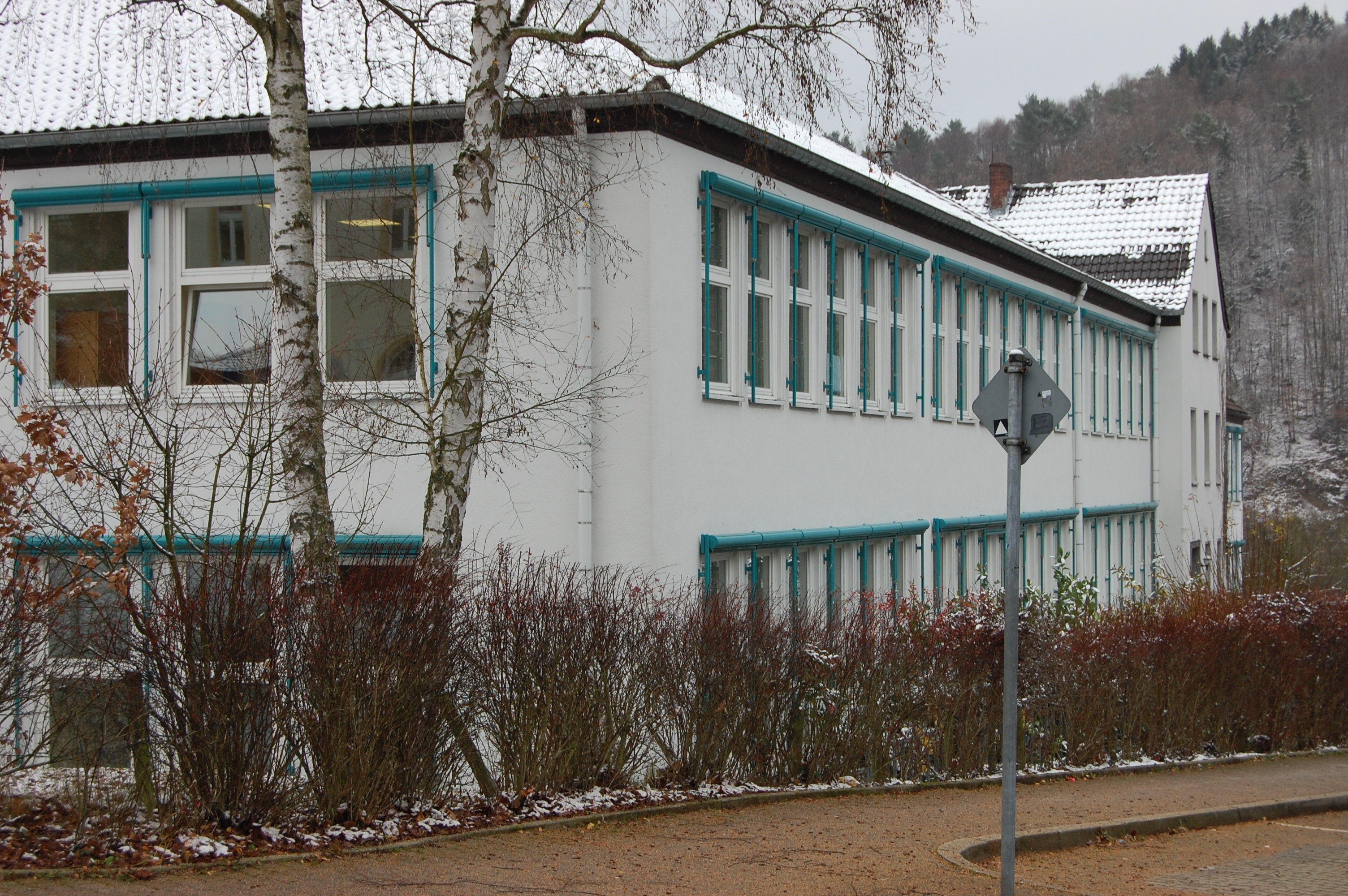 Die Realschule Schalksmühle in Westfalen von der Ecke Bergstraße - Viktoriastraße